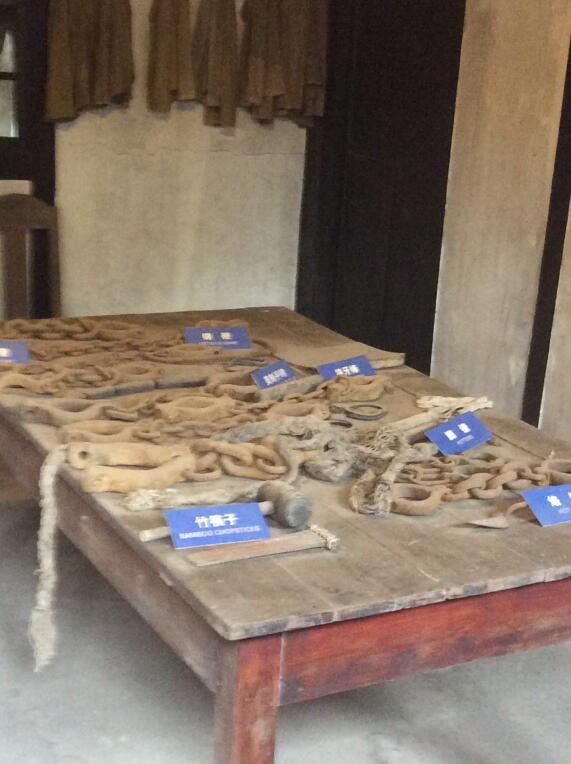 中文（中国大陆）: 渣滓洞展出的当年刑具